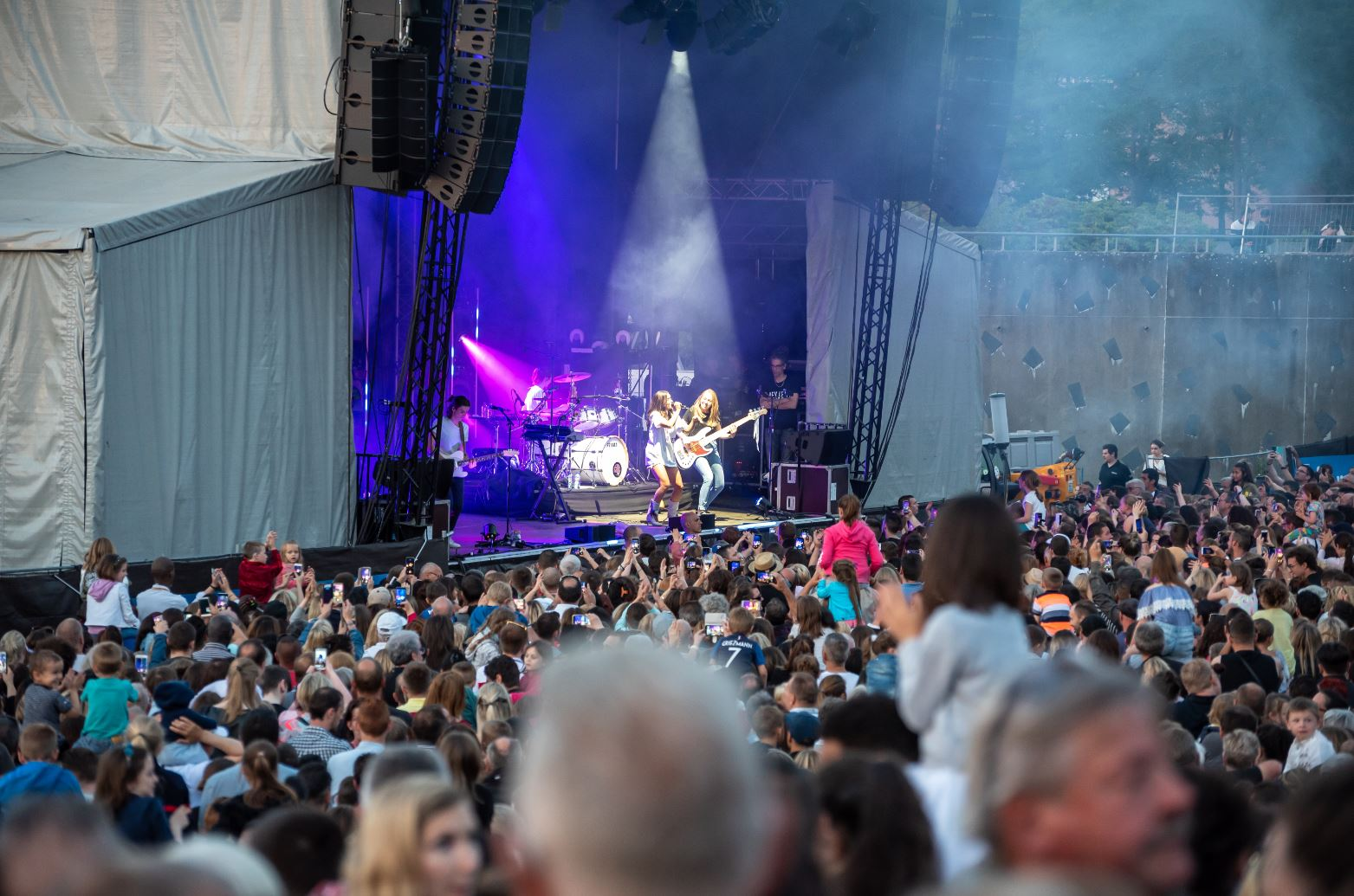 Jennifer BAKAYADES 2019